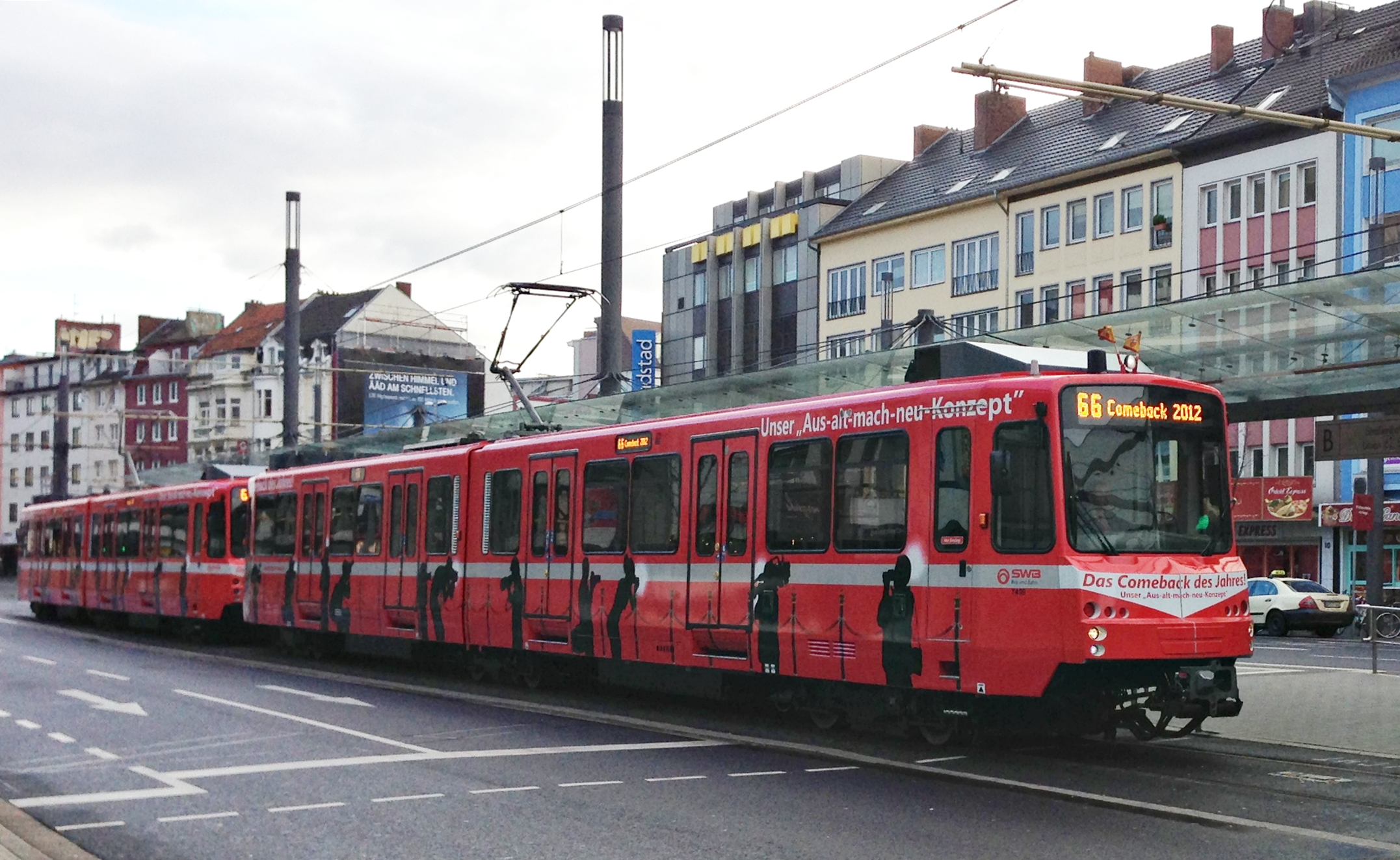 Neuerstellte Stadtbahnwagen B der SWB am Bertha-von-Suttner-Platz